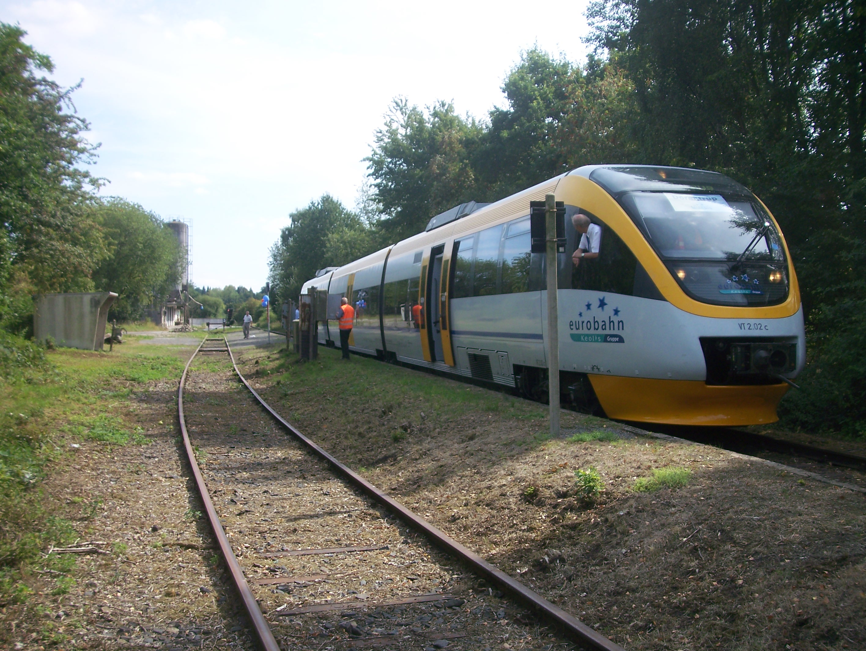 Talent-Triebwagen der Eurobahn am Haltepunkt Bega, Begatalbahn (Strecke Hameln-Lage).